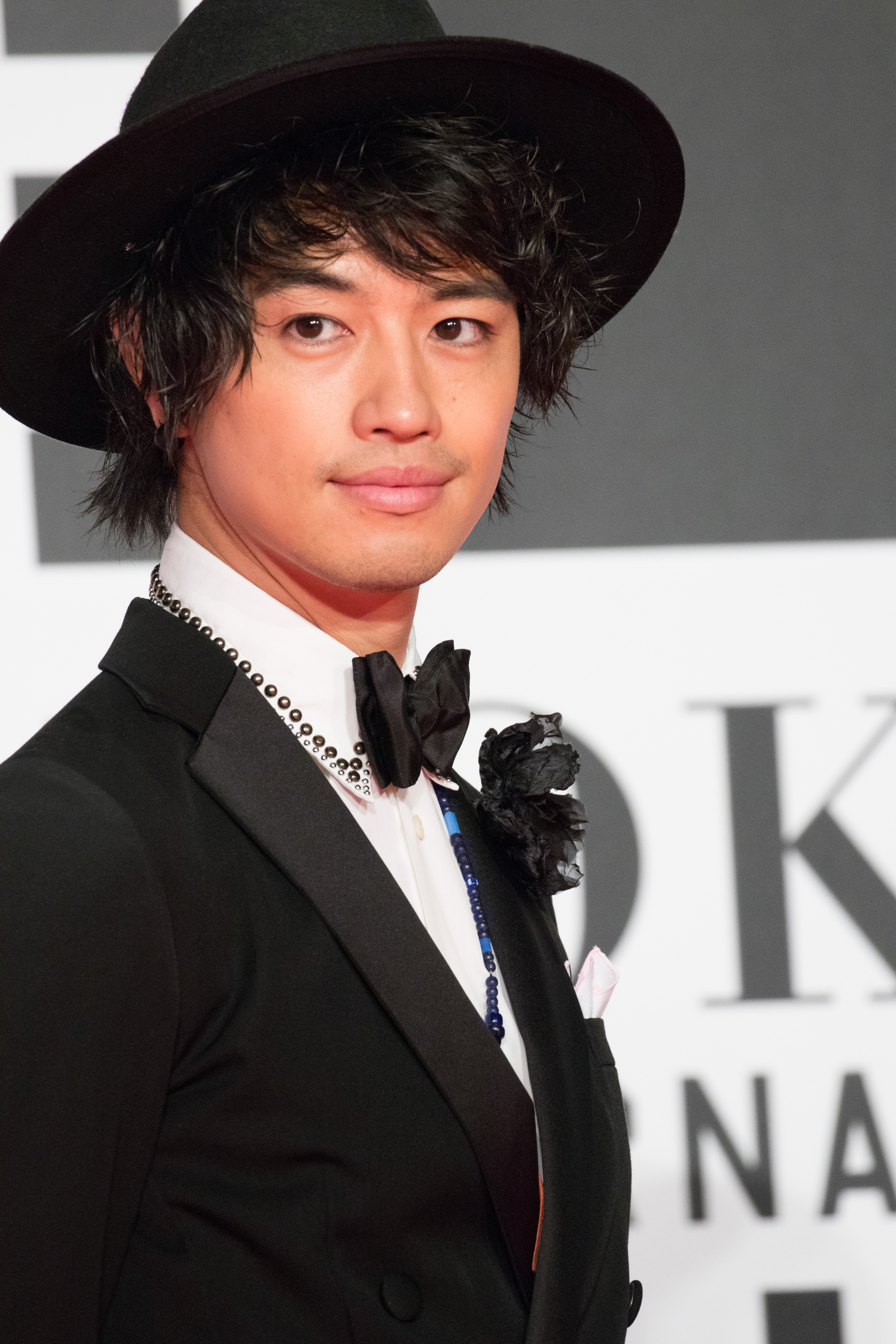 第29回 東京国際映画祭 オープニングセレモニー 斎藤工 (種まく旅人～夢のつぎ木～)